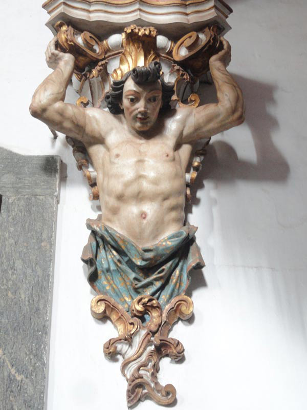 Igreja de Nossa Senhora do Carmo. Atlante de Aleijadinho.